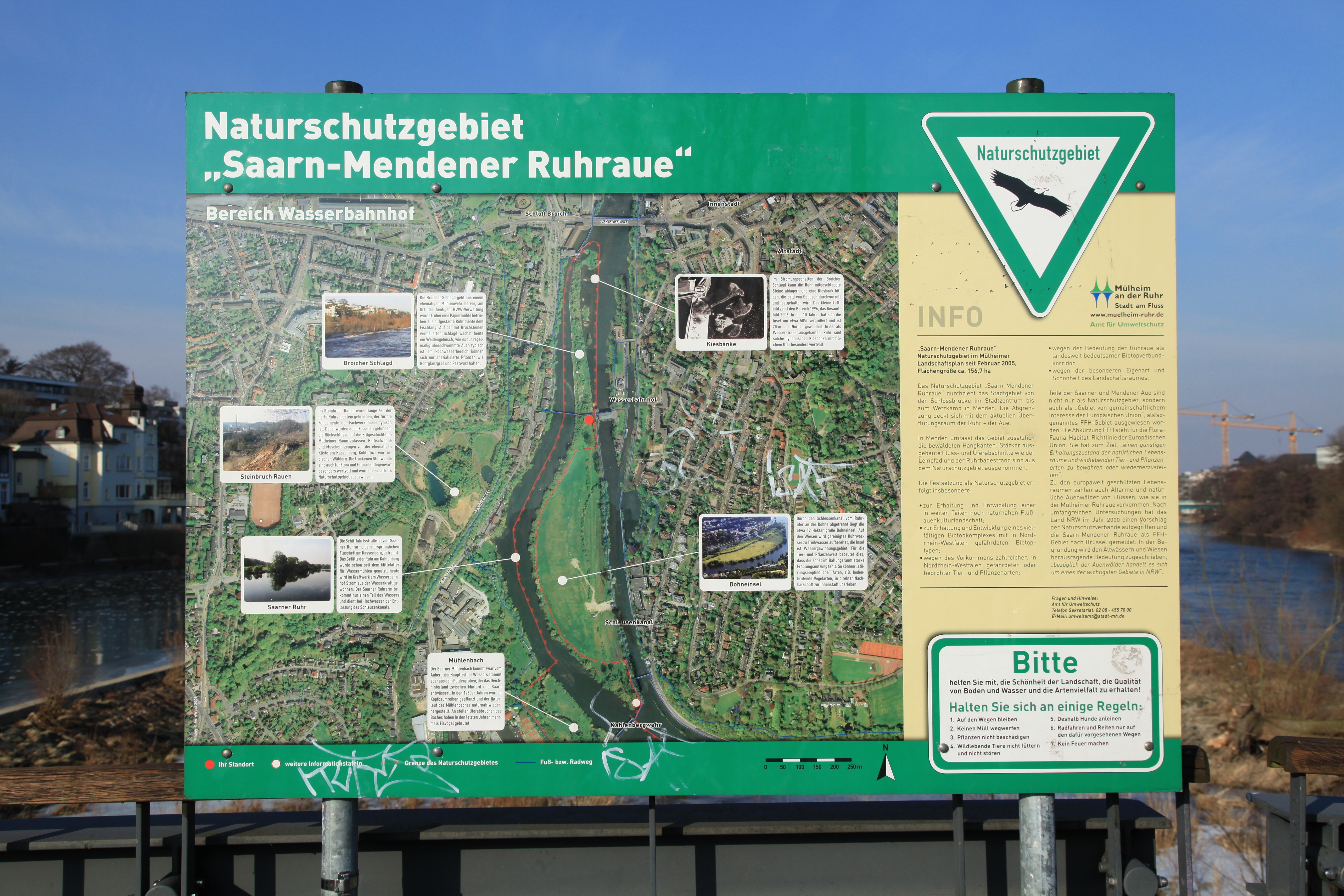 Kassenbergbrücke in Mülheim an der Ruhr; Infotafel zum Naturschutzgebiet „Saarn-Mendener Ruhraue“